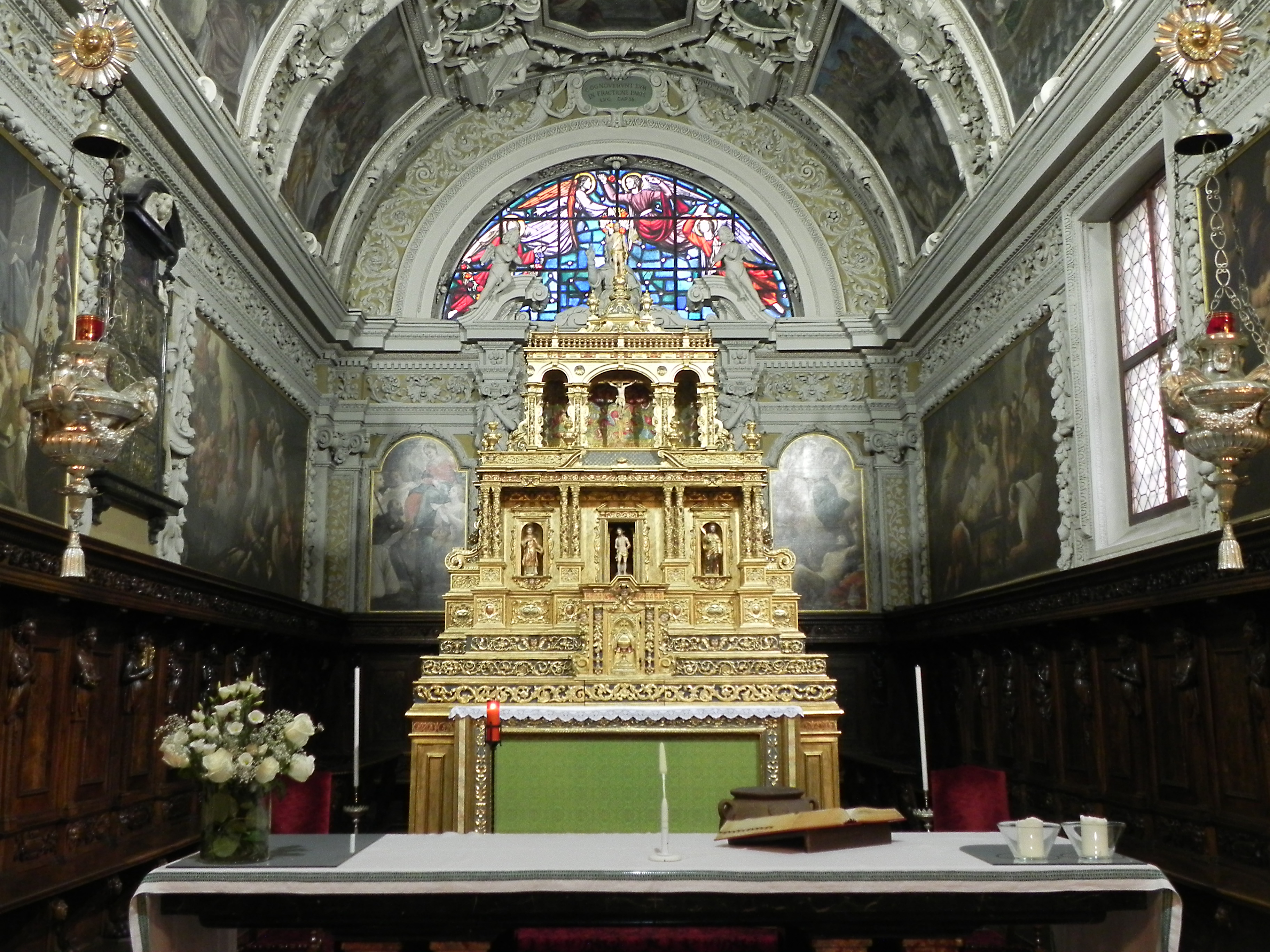 Chiesa di San Giacomo (Gromo - BG) Altare maggiore